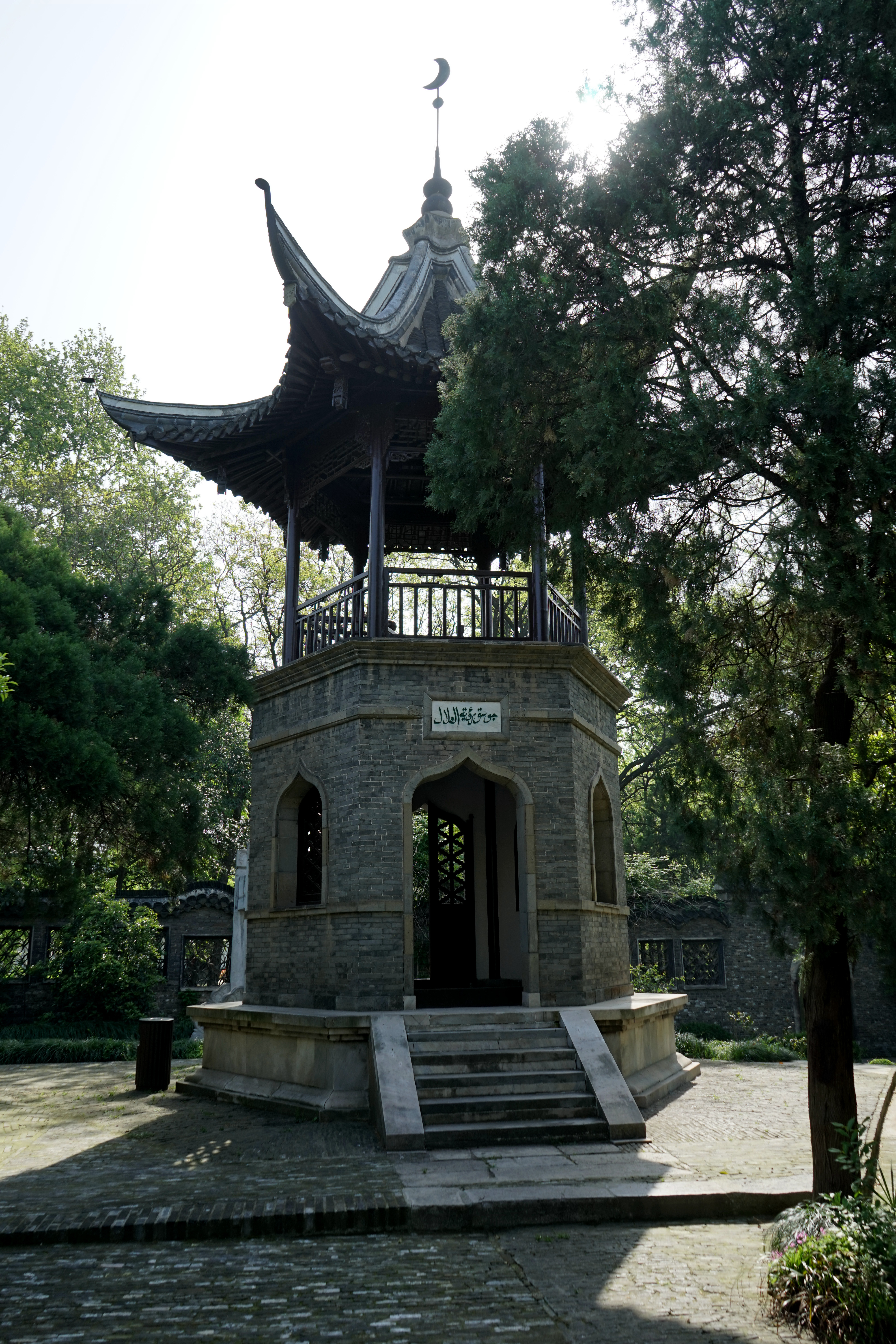 中文（中国大陆）: 望月亭。。